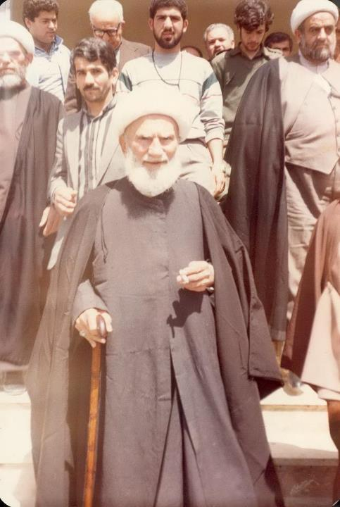 الشيخ محمد تقي الفقيه ويبدو في يمين الصورة الشيخ عبد الأمير قبلان